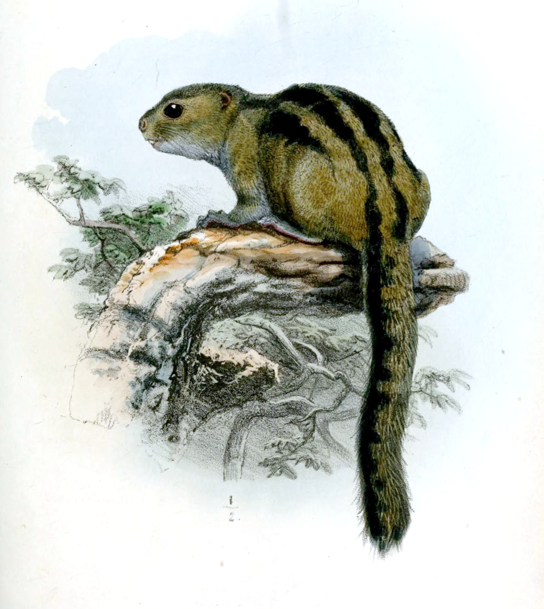 Sciurus isabella=Funisciurus isabella